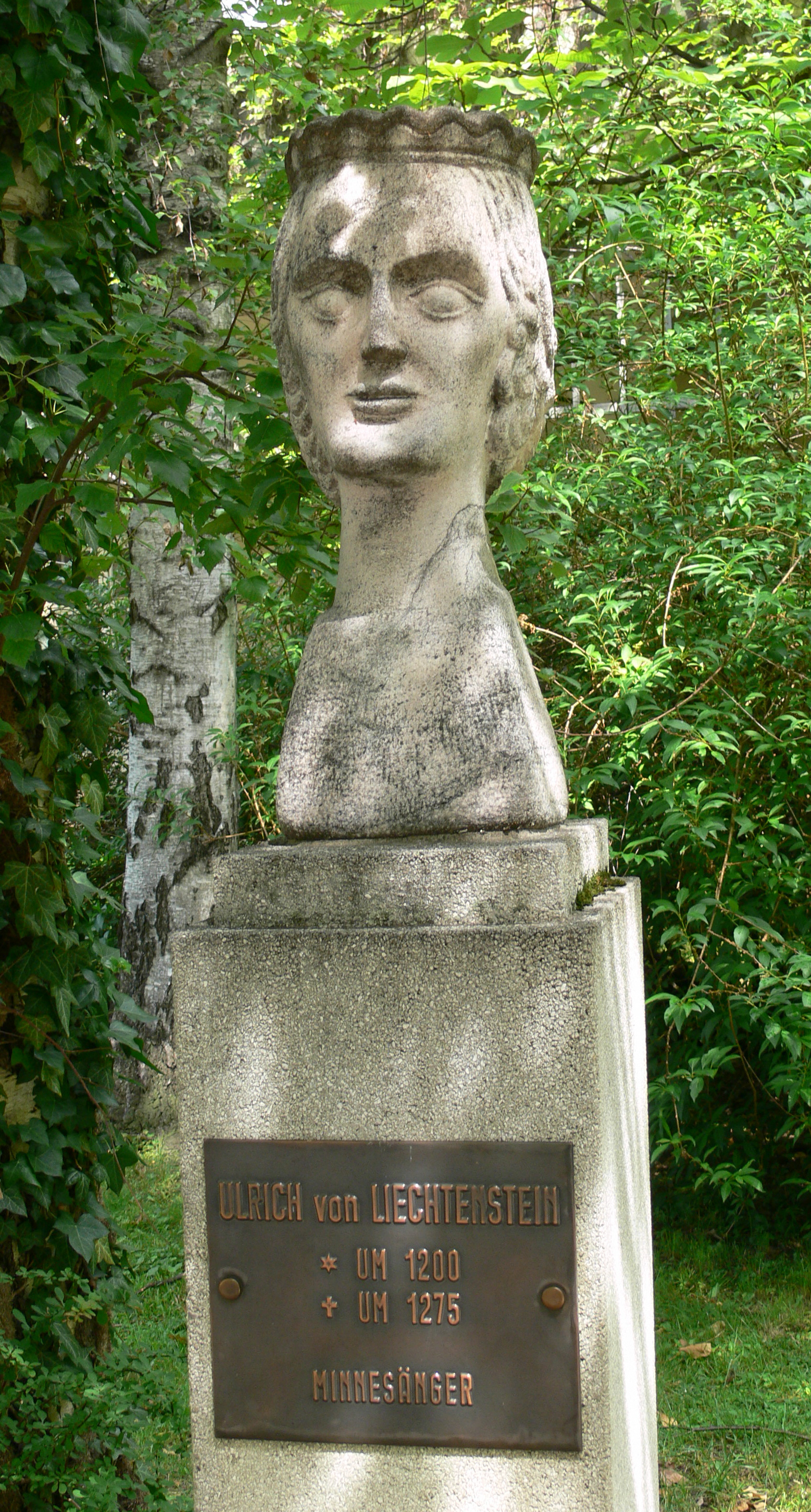 Ehrengalerie in einem Hof der Grazer Burg Büste „Ulrich von Liechtenstein“ von Alfred Schlosser, 1959